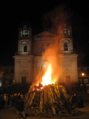 'U Zuccu di Natale - Zafferana Etnea (CT) - Foto D. Pennisi